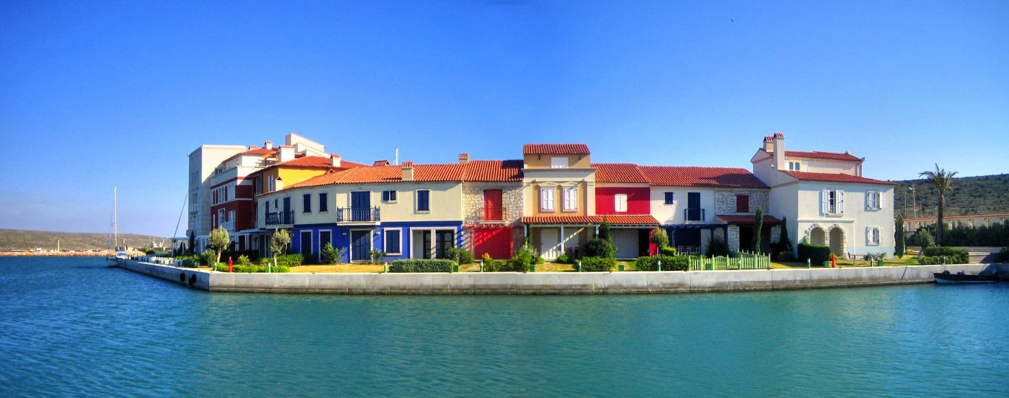 Houses along the quay, Alaçatı, İzmir, Turkey